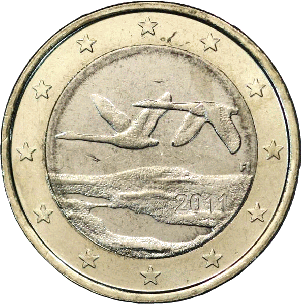 Pièce de 1 euro finlandais 2011